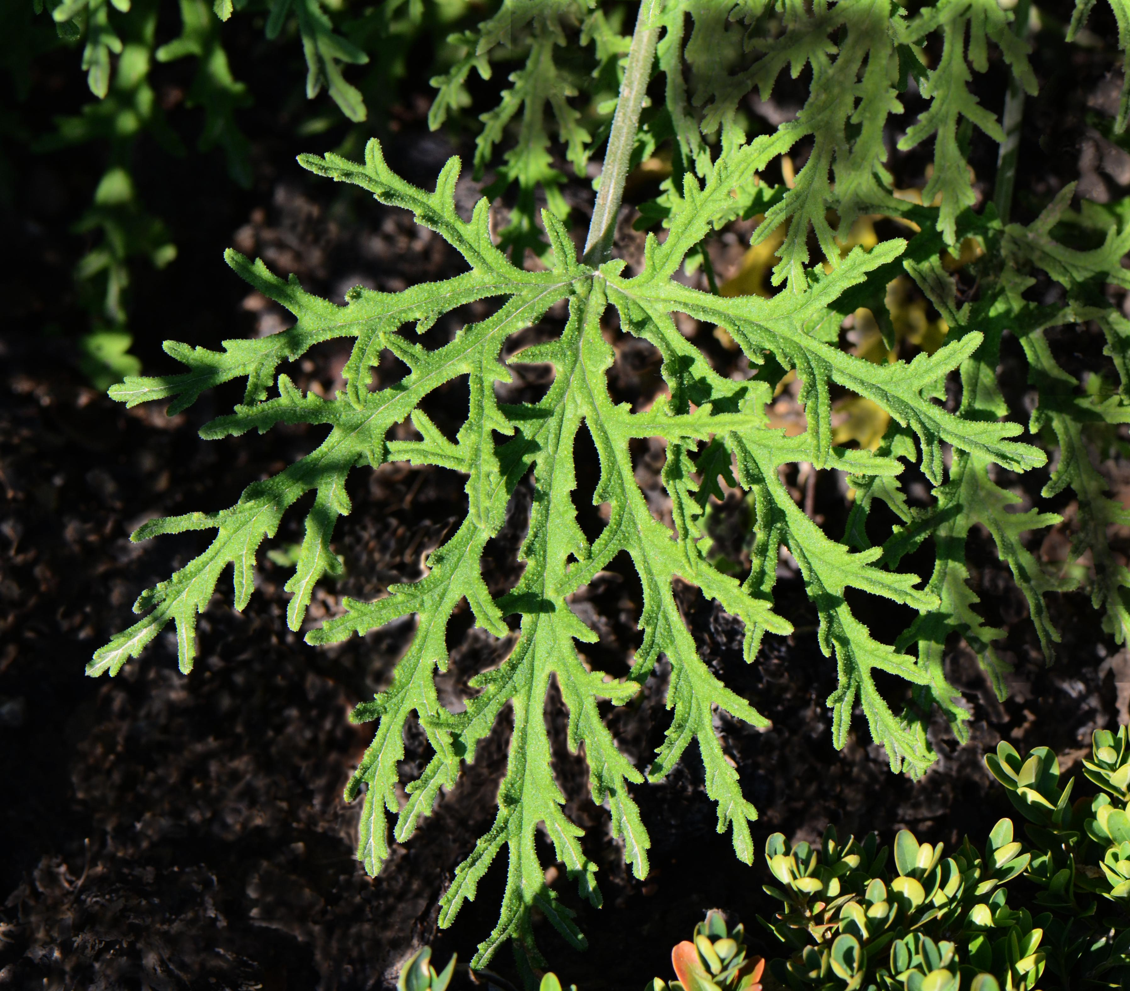 Feuille de Pelargonium radens, Jardin des Plantes de Paris